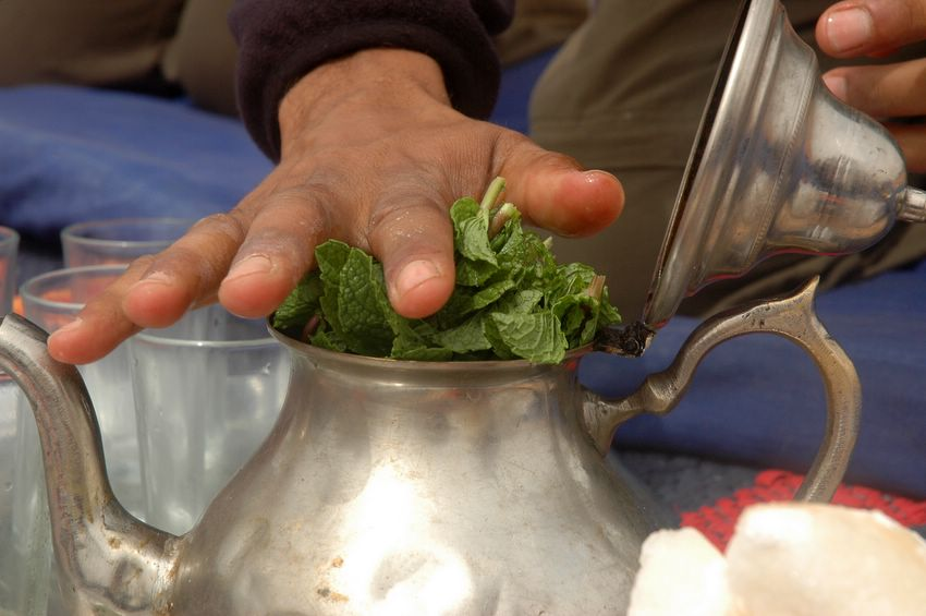 Ajout de la menthe... Thierry Milherou